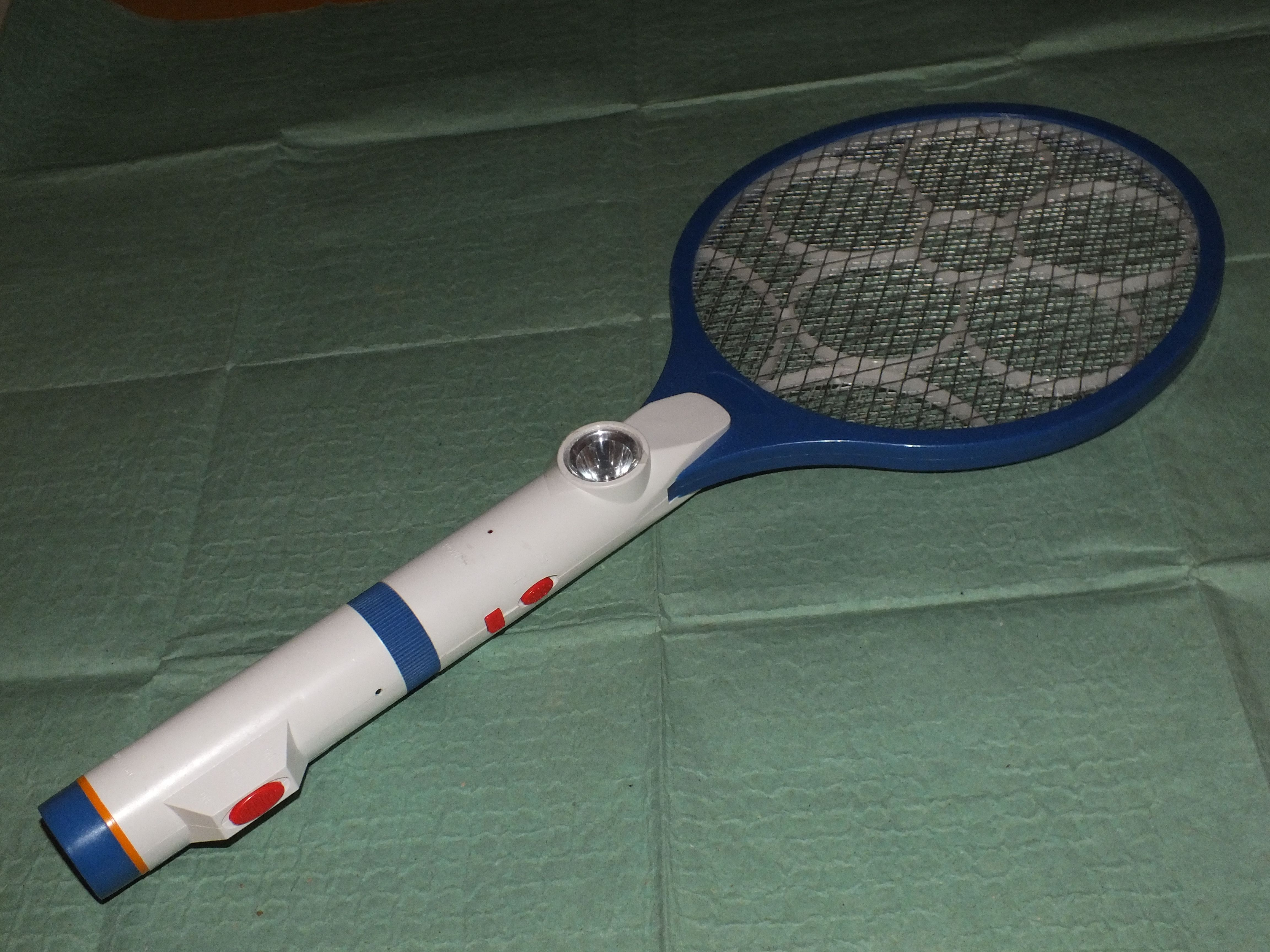 Электрическая мухобойка